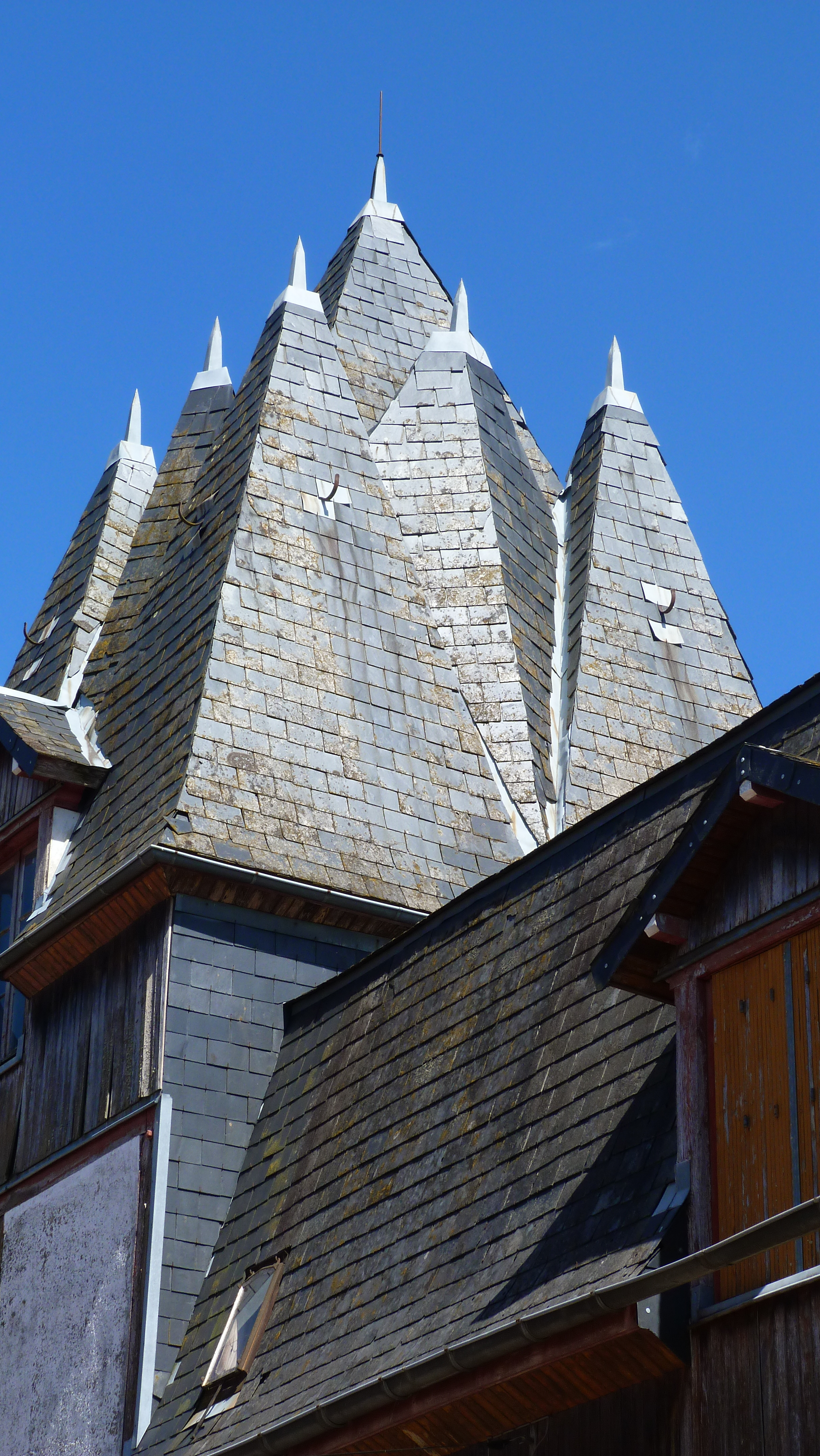 Tegmento en Cencerey